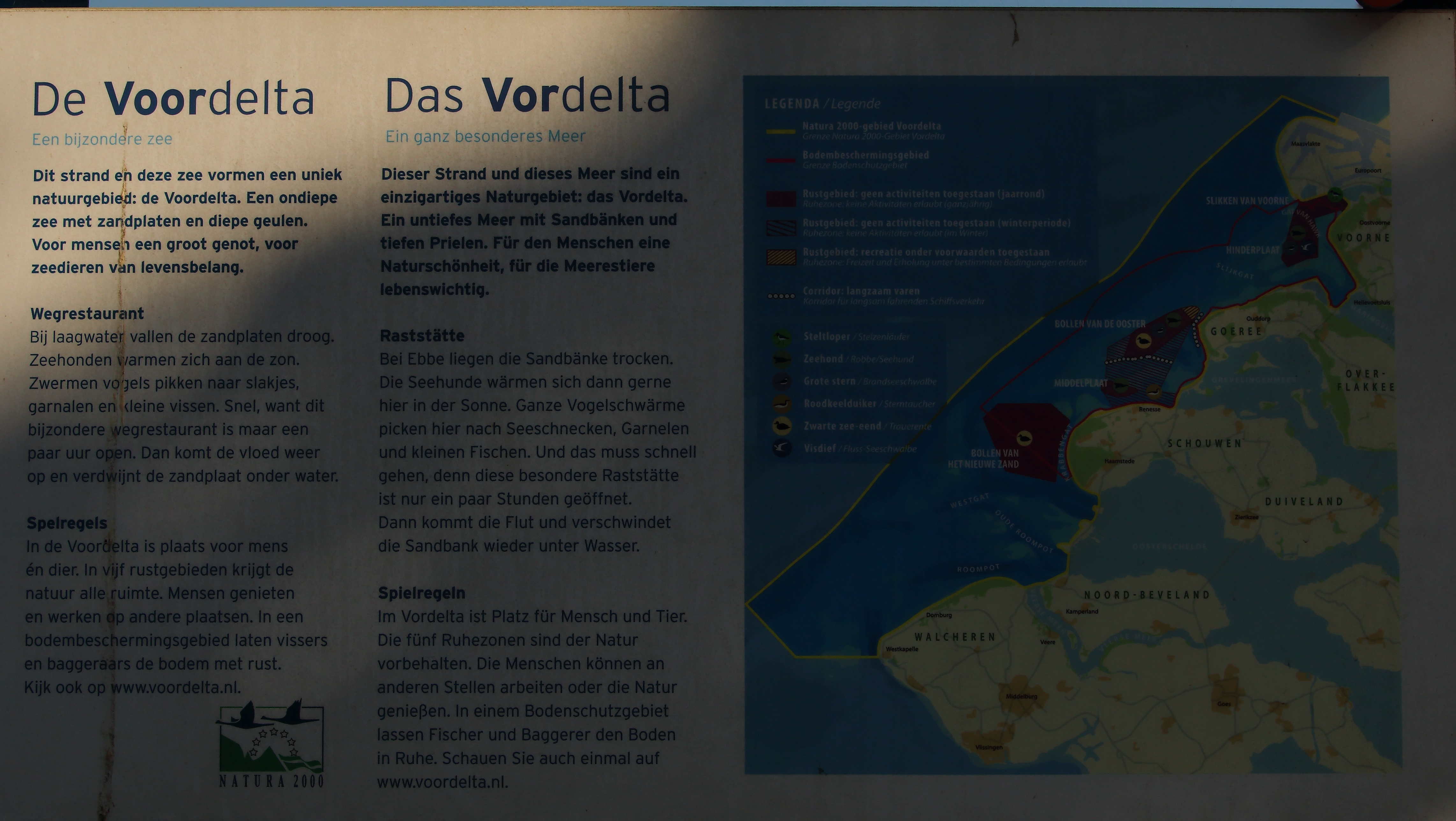 Natura 2000 Voordelta Nederland